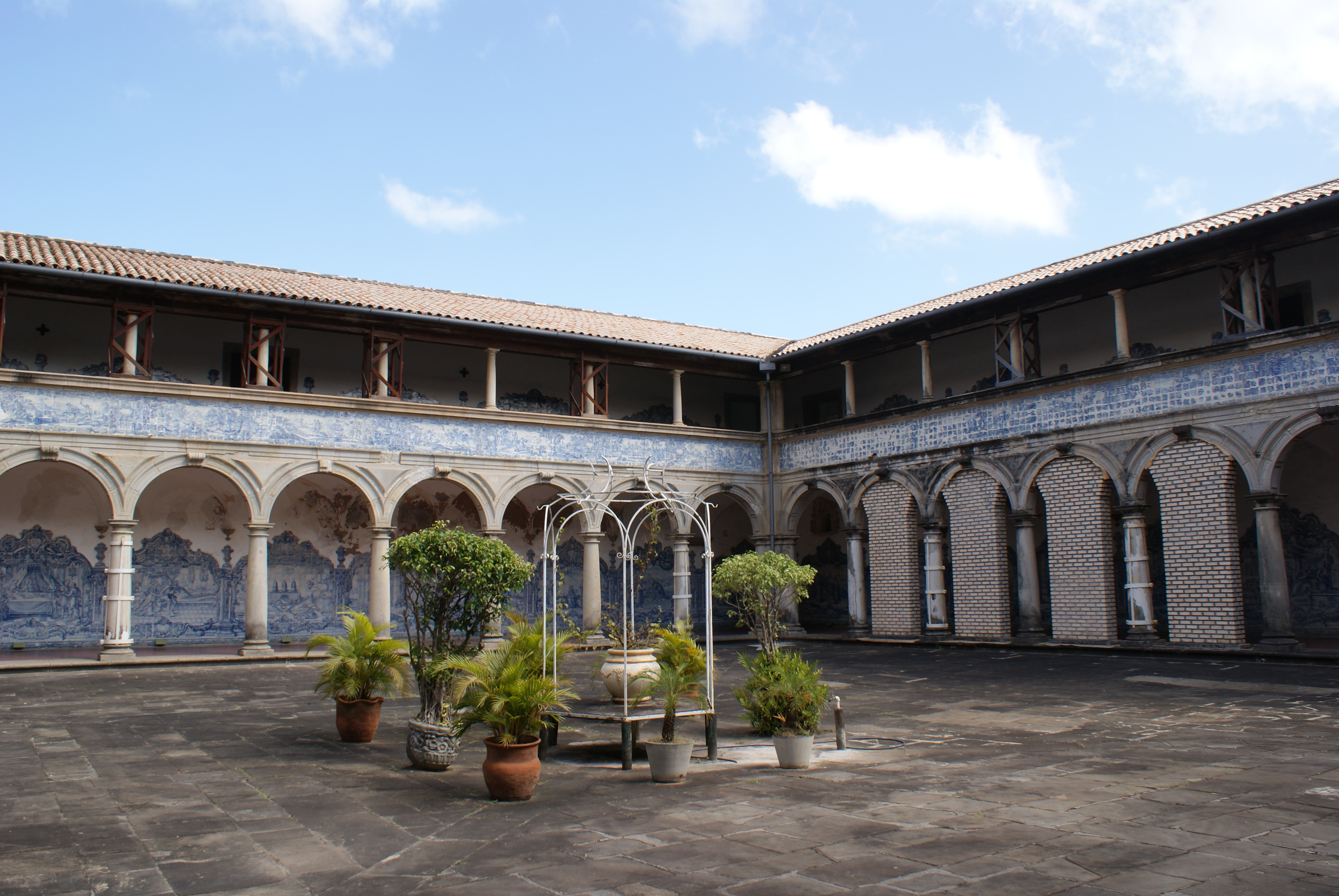 Trip to Salvador & Praia do Forte, Bahia, Brazil